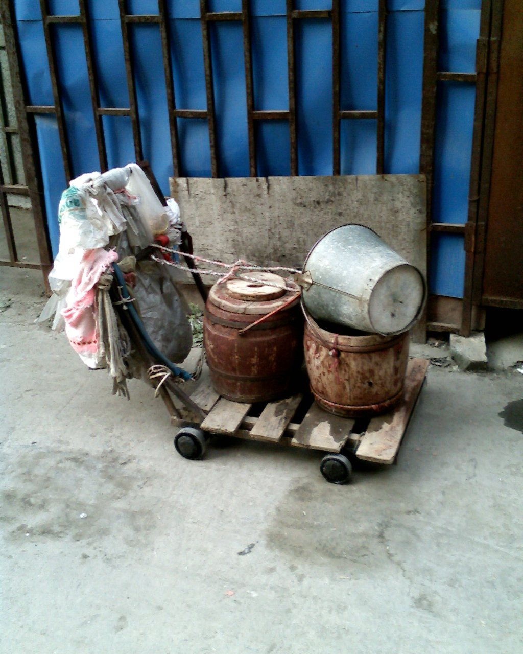 南京倒马桶工人的小车。根据2011年的媒体报道，它的主人——七十九岁的冯桂芬是南京仅剩的一个倒马桶工人。